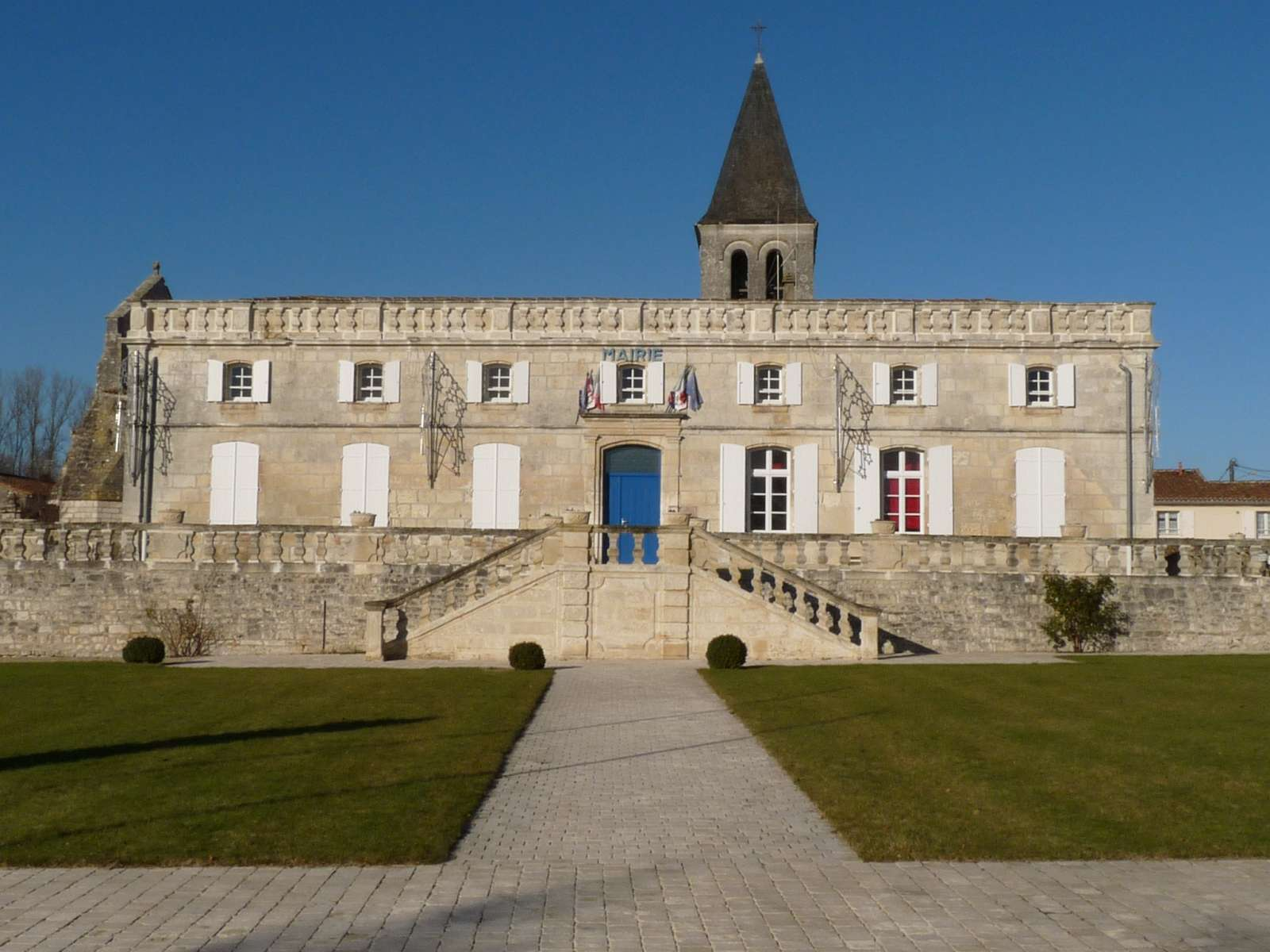 mairie de Sireuil, Charente, France